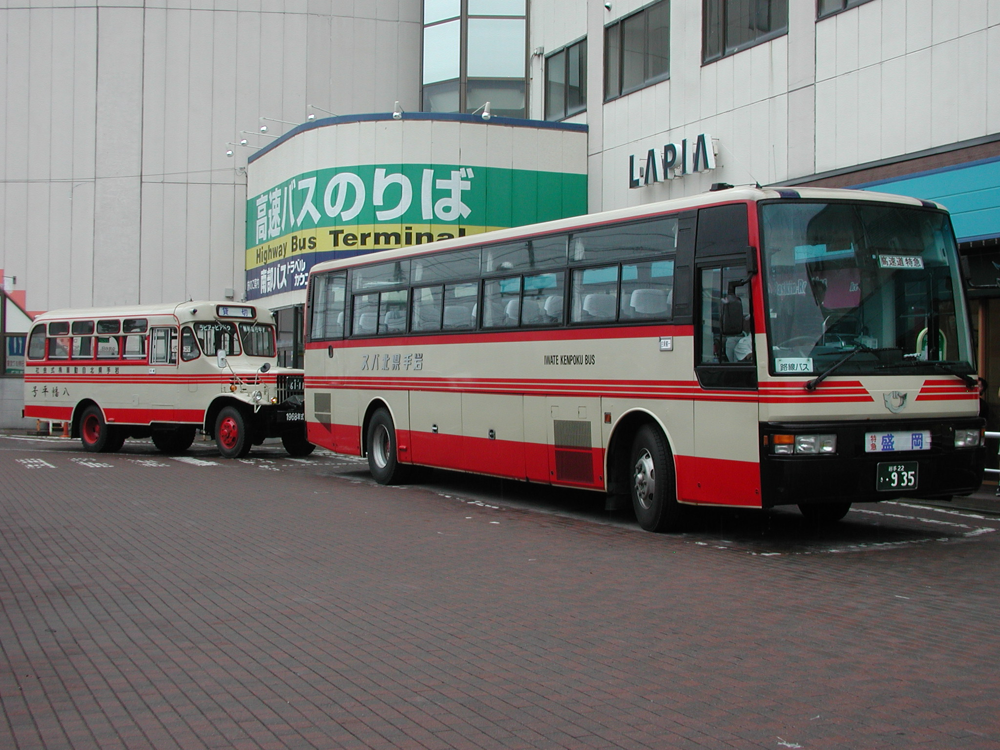 岩手県北自動車の新・旧各世代の車両の並び 前：日産ディーゼル・U-RA520系・U-RA520TBN：折戸仕様：「八盛号」 後：いすゞ・TSD40改：ボンネット車両「八幡平号」 ★：八戸ラピアバスターミナル（八戸市）にて行われた、南部バスなどが主催するイベント内おいて撮影